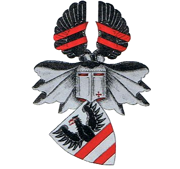 Wappen der Soye (Zoege von Manteuffel)